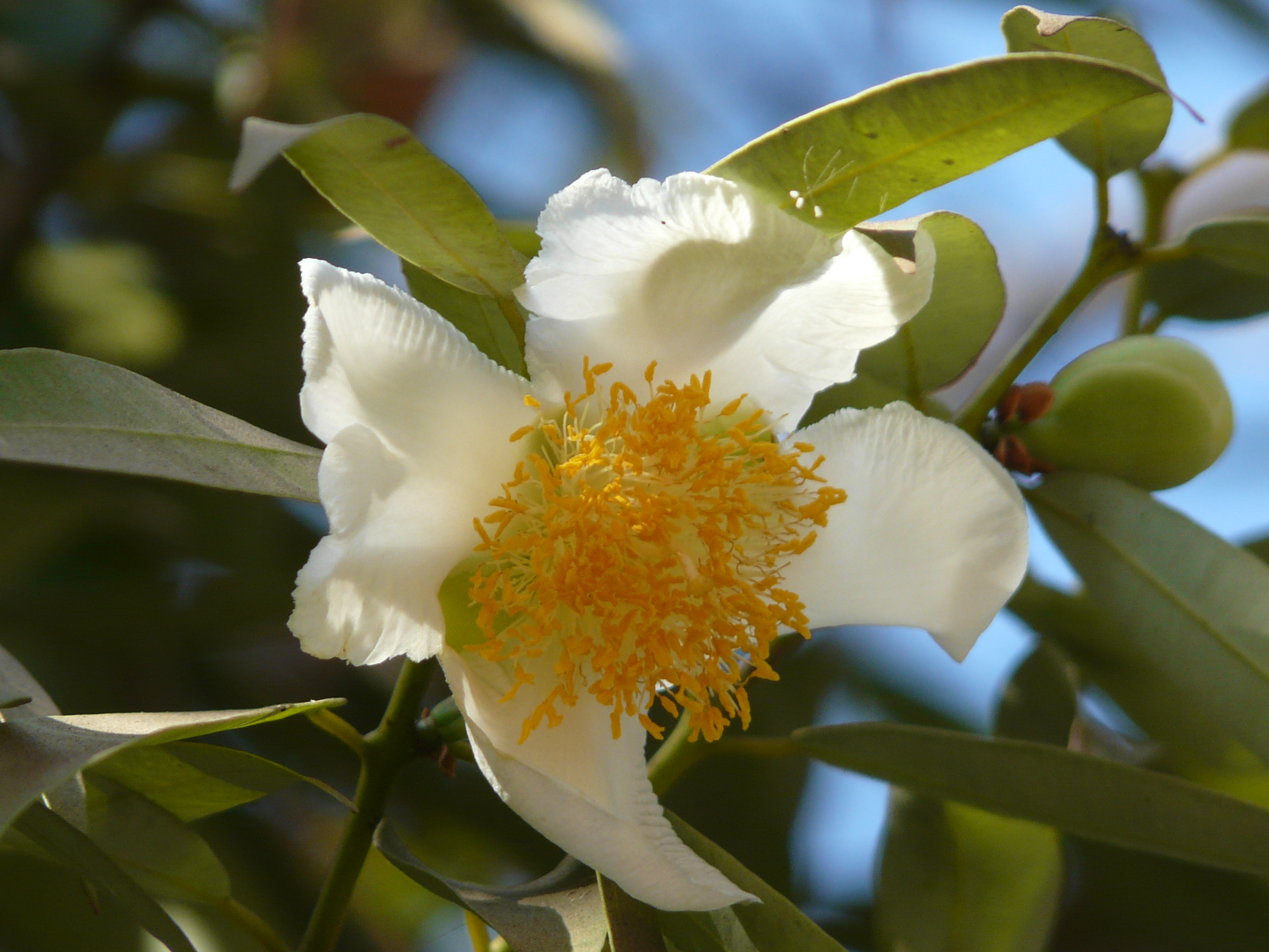 Calophyllaceae (Calophyllum family) » Mesua ferrea L. ¿ may-SEW-ah ? -- named after Mesue, father-son, Arabian physicians and botanists ... A Pocket Botanical Dictionary by Sir Joseph Paxton, John Lindley FER-ee-uh -- of iron ... Dave's Botanary commonly known as: Ceylon ironwood, cobra's saffron, Indian rose chestnut • Assamese: নাহৰ nahor, নোক্তে nokte • Bengali: নাগেশ্বর nagesar • Garo: kimde • Gujarati: નાગકેસર nagkesar • Hindi: नागेसर nagesar • Kannada: ನಾಗಕೇಸರ nagakesara, ನಾಗಸಂಪಿಗೆ nagasampige • Kashmiri: नागकेसरः nagkesarah • Konkani: नाग चम्पो nag champo, व्हडलो चम्पो vhadlo champo • Malayalam: നാഗകേസരം nagakesaram • Manipuri: নাগেসৰ nageshor • Marathi: नागचाफा nag chafa, नागकेशर nagkeshar • Mizo: herh-sê • Nepali: नाग केशर nag keshar • Oriya: ନାଗ କେଶର naga keshara • Pali: नाग naga • Punjabi: ਨਾਗਕੇਸਰ nagkesar • Sanskrit: नागकेसर nagakesara • Tamil: நாகமரம் nakamaram • Telugu: నాగకేసరము naga-kesaramu • Tibetan: na ga ge sar • Tulu: ಬೈನಾವು bainavu, ಕೇಶರ keshara Native of: India, Nepal, Myanmar, Thailand, Vietnam, Indonesia, Malaysia References: Flowers of India • Wikipedia • ENVIS - FRLHT